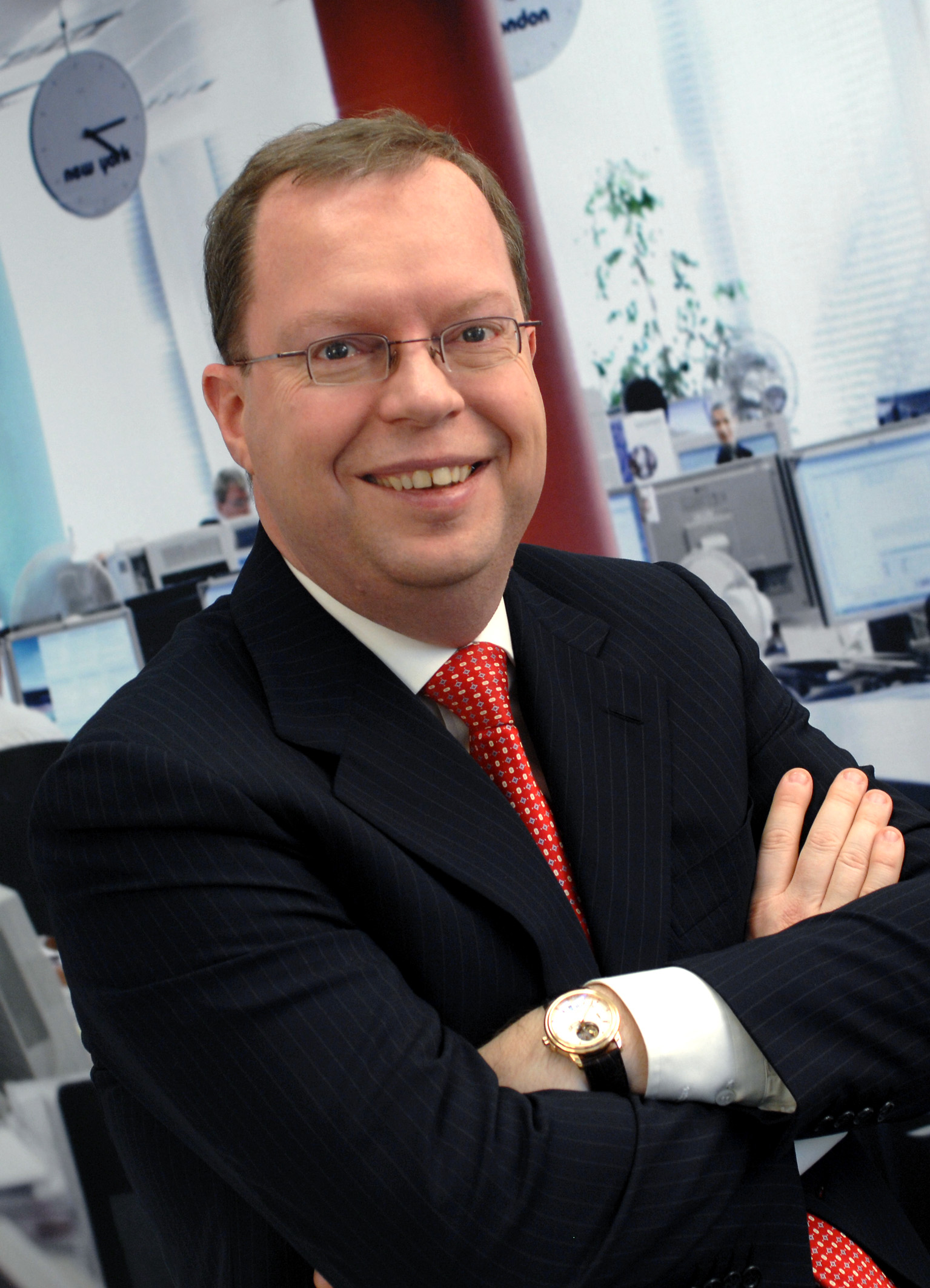 Peter Terium. Terium is sinds 1 oktober 2009 Chief Executive Officer (CEO) van Essent. Sinds 1 september 2011 is Terium tevens vice-voorzitter van de Executive Board van RWE AG. Foto: Essent; Castel Communicatie